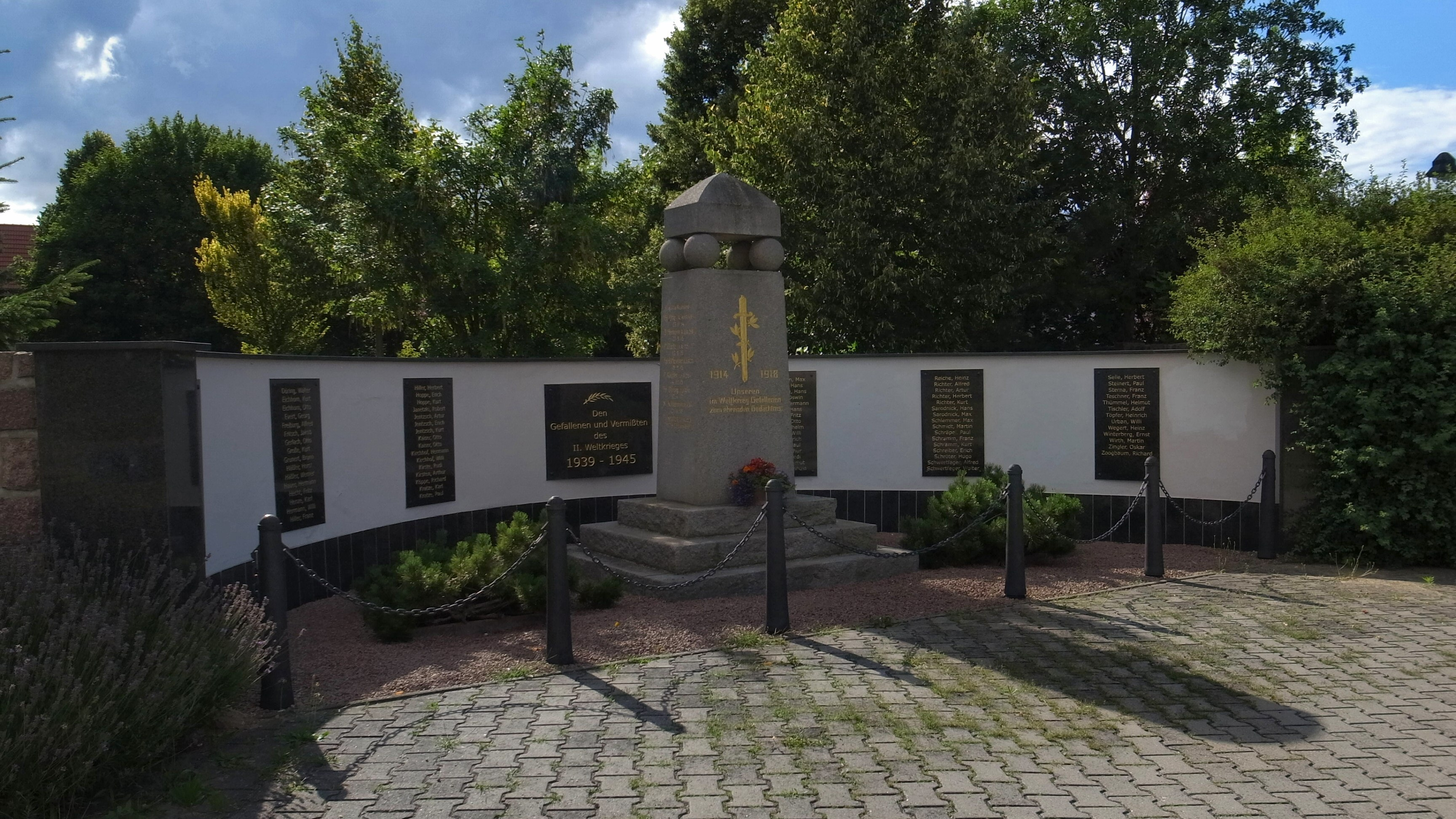 Bitterfeld-Wolfen, Ortsteil Thalheim, Kriegerdenkmal (Baudenkmal im Denkmalverzeichniss Sachsen-Anhalt, Erfassungsnummer: 094 96533 000 000 000 000 [1])